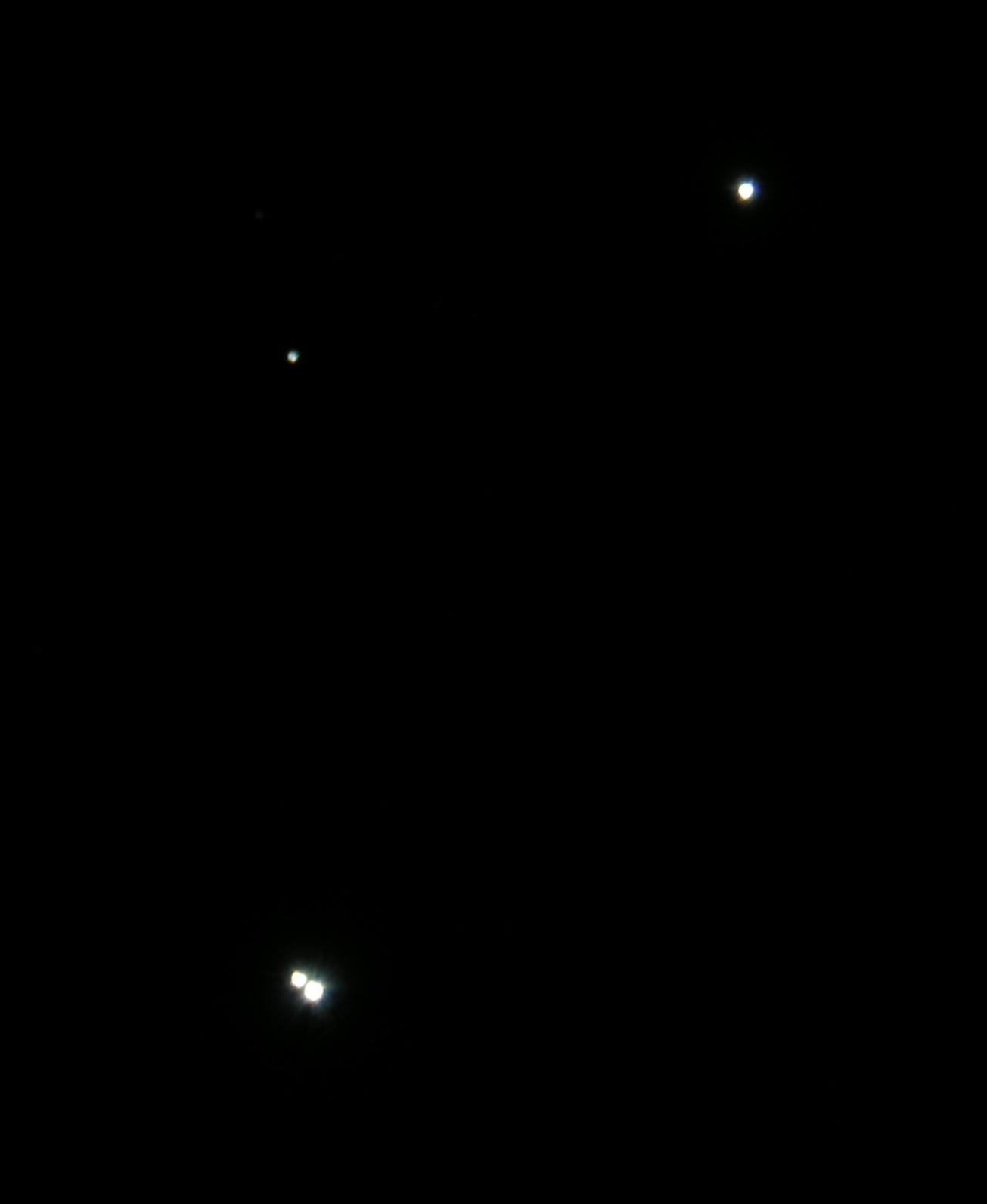 Photo prise en afocal derrière un télescope prêté par un membre du club d'astronomie de Belfort.